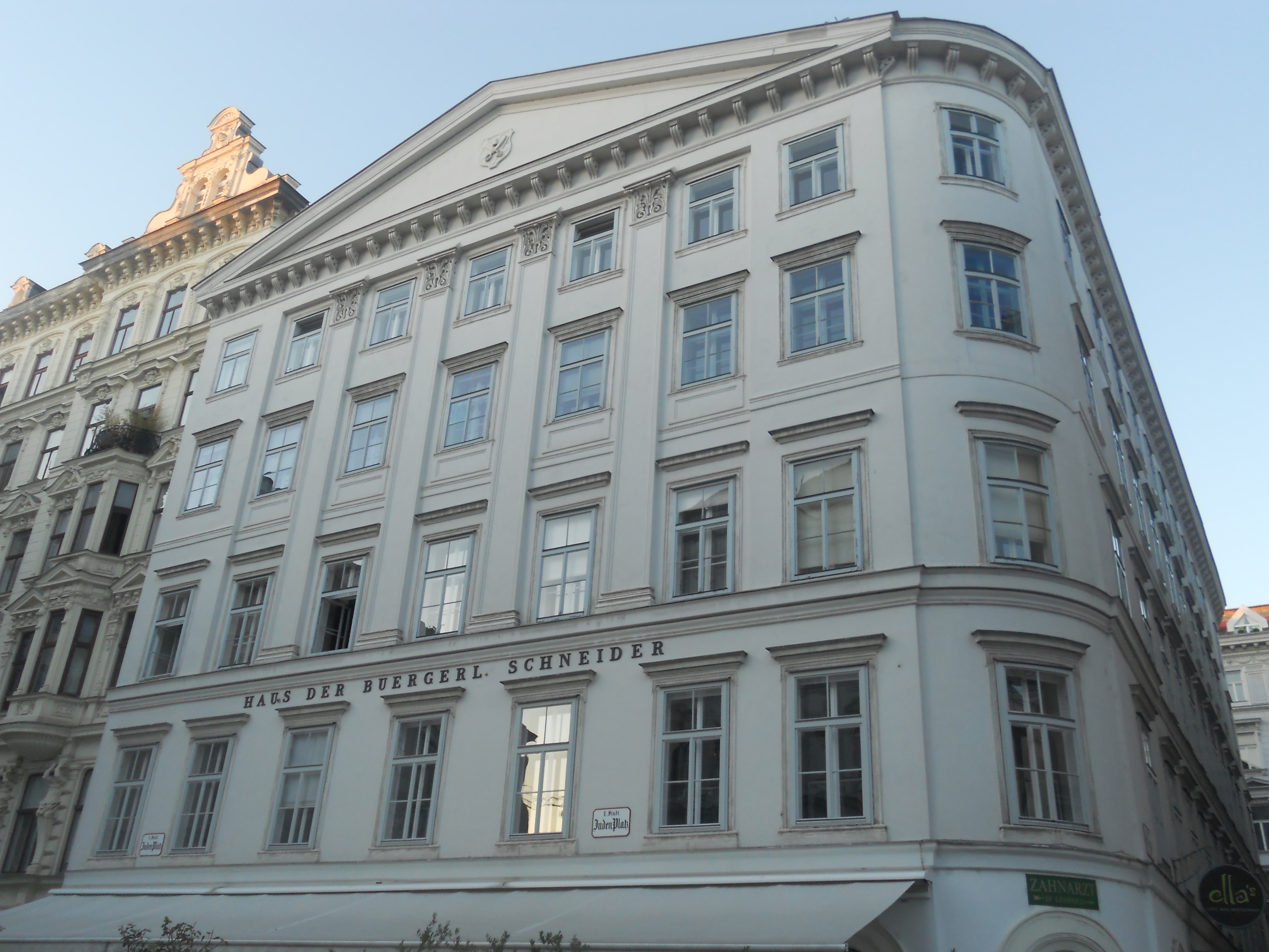 Haus der Genossenschaft der Kleidermacher Fütterergasse 1 (= Judenplatz 10, Wipplingerstraße 9) in Wien